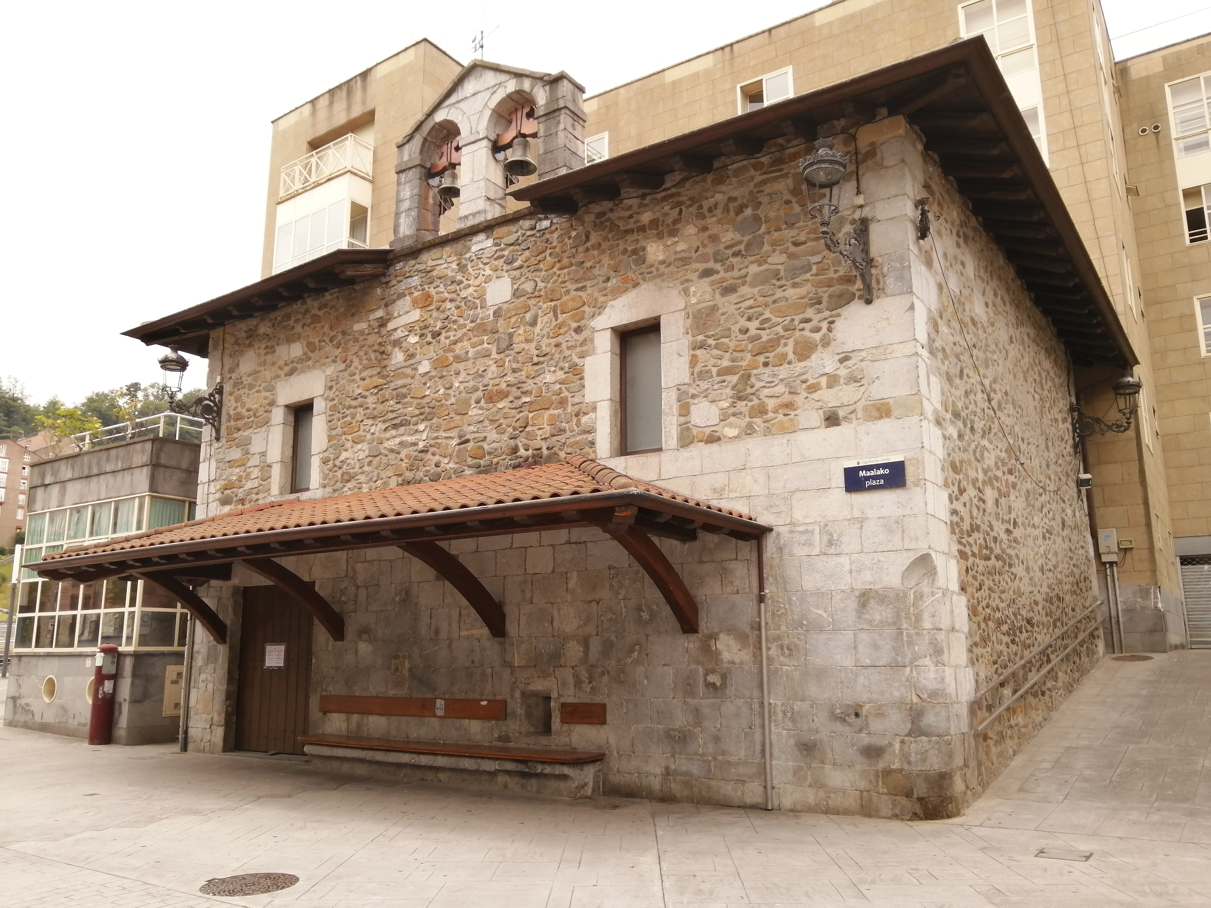 Elgoibarreko Madalena ermita.